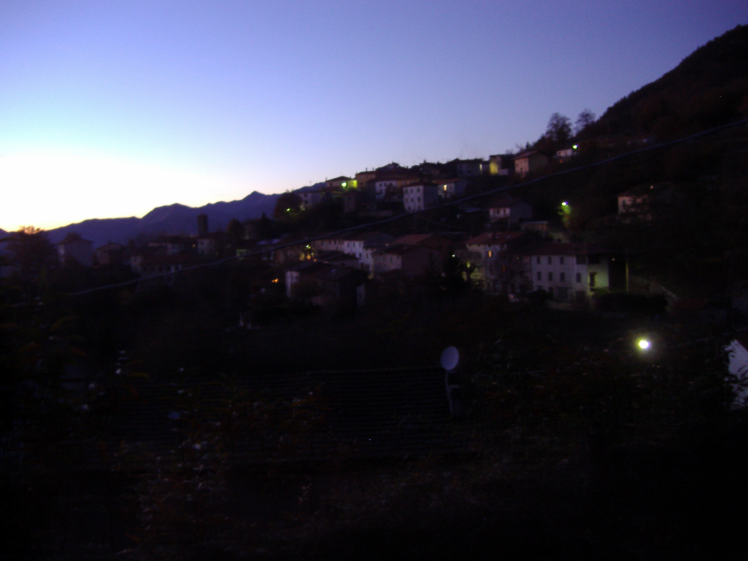 Veduta notturna di Prataccio, Piteglio (PT)